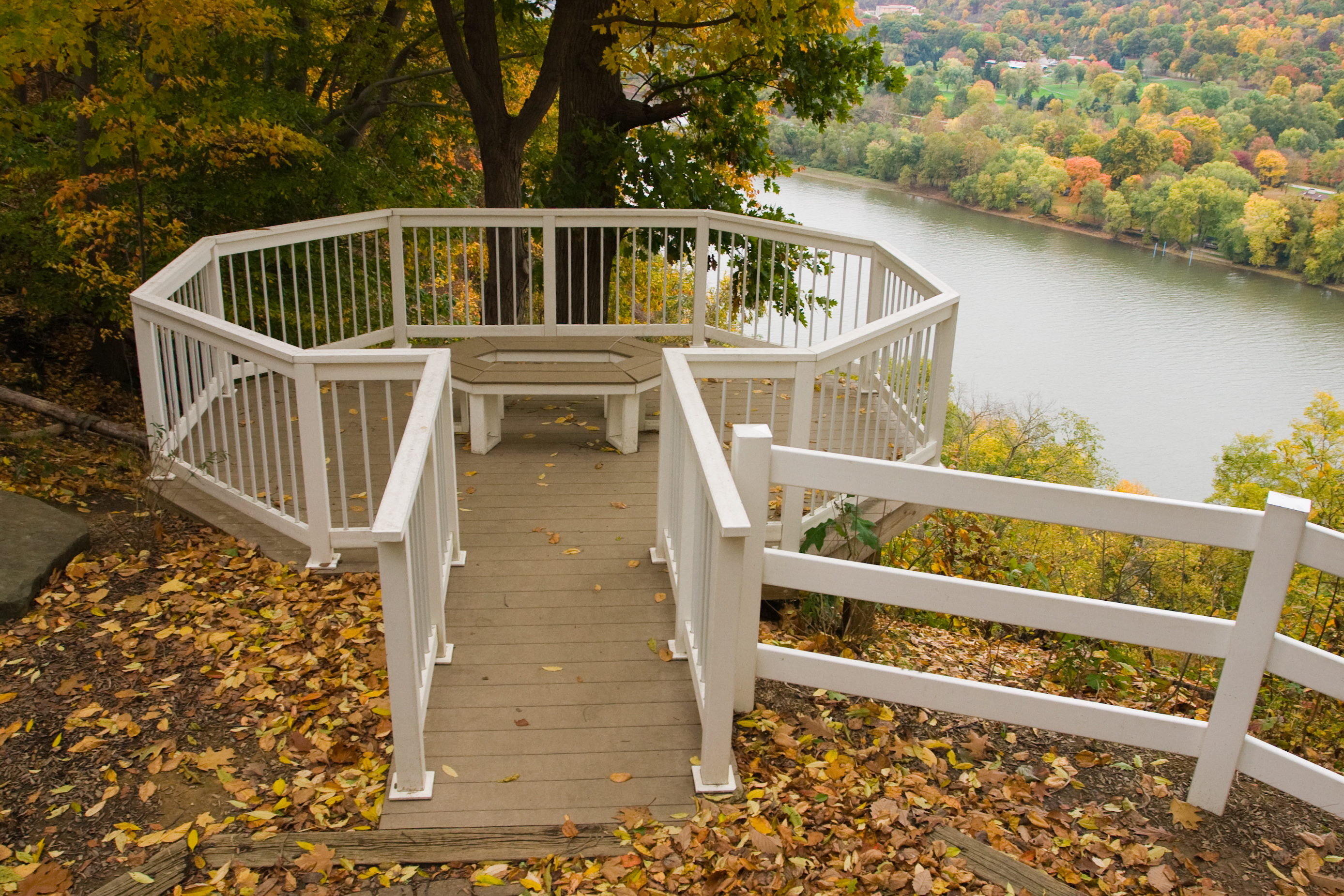 Overlook in Harrison Hills Park outside Pittsburgh, Pennsylvania